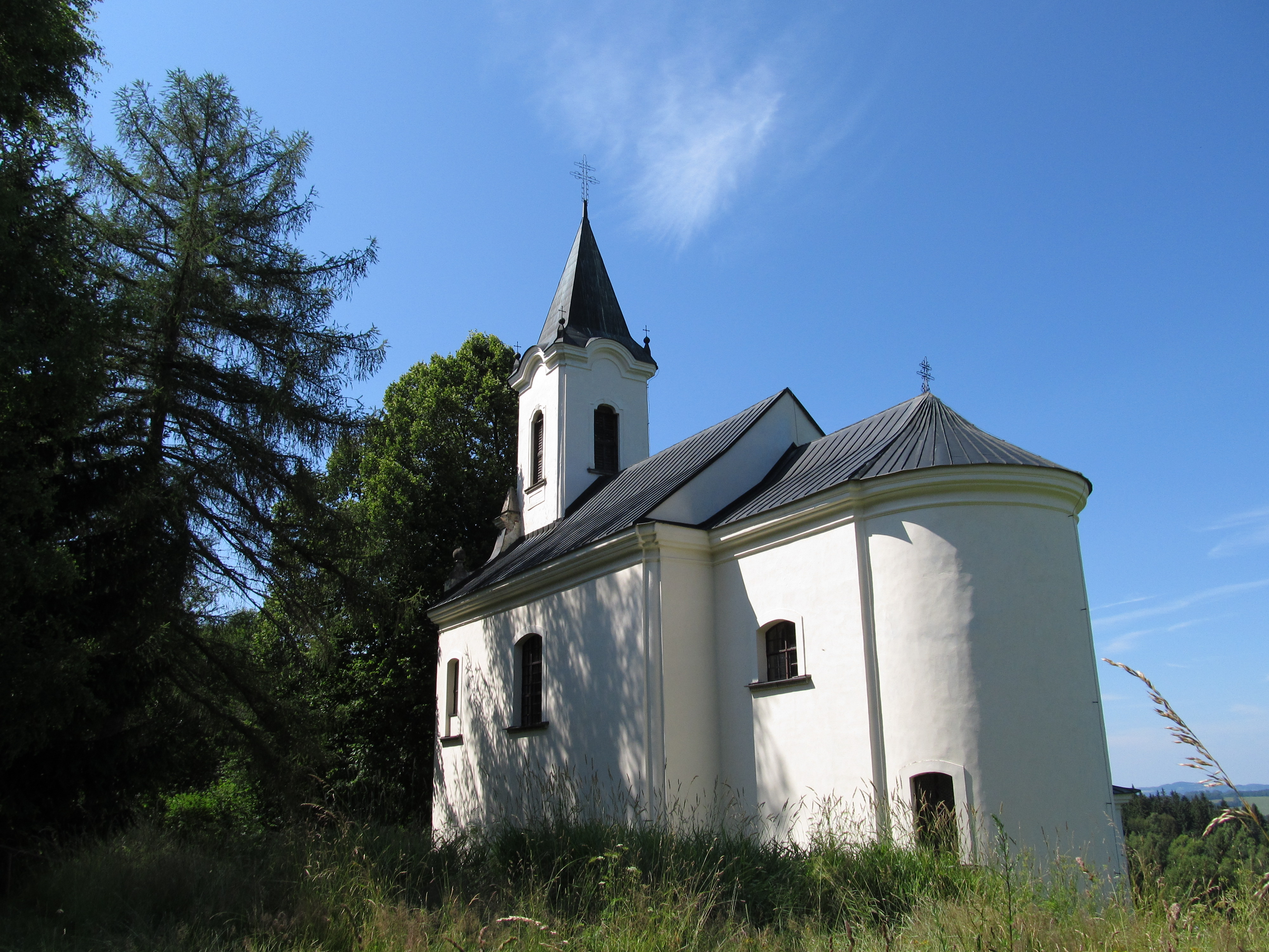 Kostel sv. Maří Magdalény (Volary), nad Zbytinami, Volary